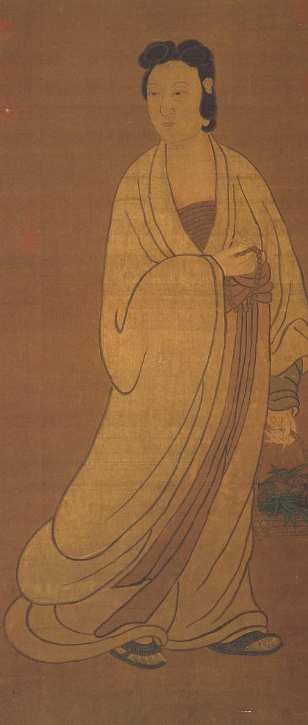 Attribué à ZHAO Meng-Fu (dynastie Yuan), anonyme, dynastie Ming (1368-1644) Rouleau, peinture en couleurs sur soie - 122,6cm x 61,3cm